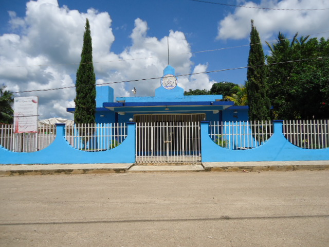 Iglesia Nacional Presbiteriana de México Espíritu Santo, Calle Reforma x Benito Juárez y Guadalupe Victoria, Kantunilkin, Quintana Roo